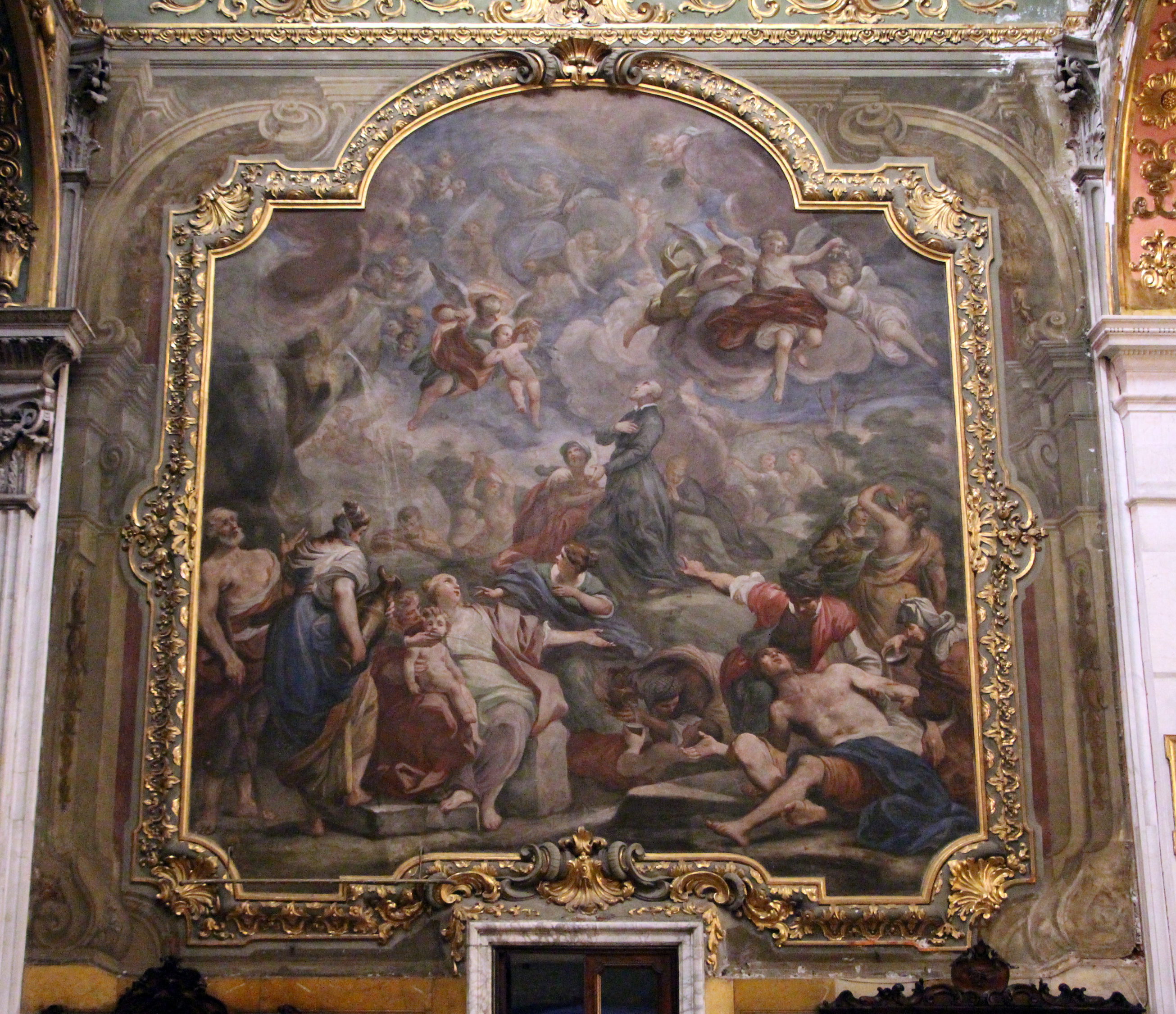 Santa Maria Maddalena (Genova) The making of this document was supported by Wikimedia CH. (Submit your project!) For all the files concerned, please see the category Supported by Wikimedia CH.